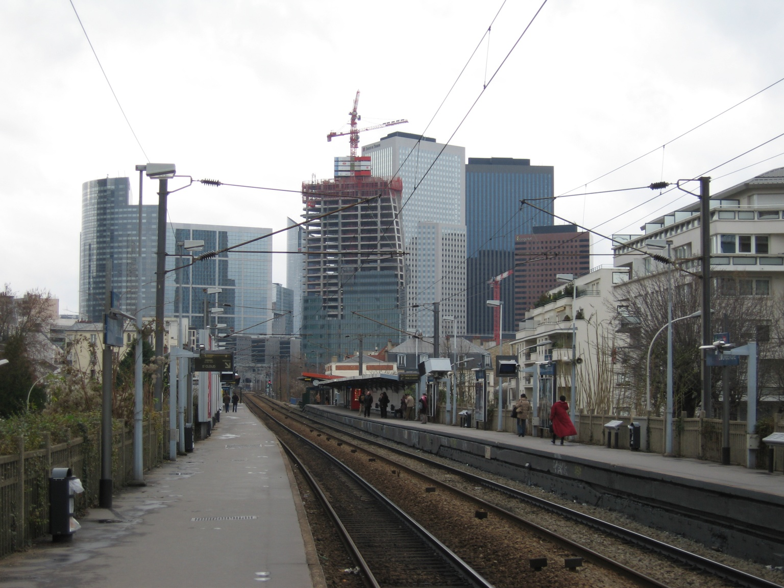 Gare de Courbevoie, Hauts-de-Seine, France. Le nord de La Défense en fond.